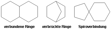 Cycloalkane: Verbundene und verbrÃ¼ckte Ringe sowie Spiroverbindung Erstellt mit ACD/ChemSketch Ersteller: Benutzer:Thiesi